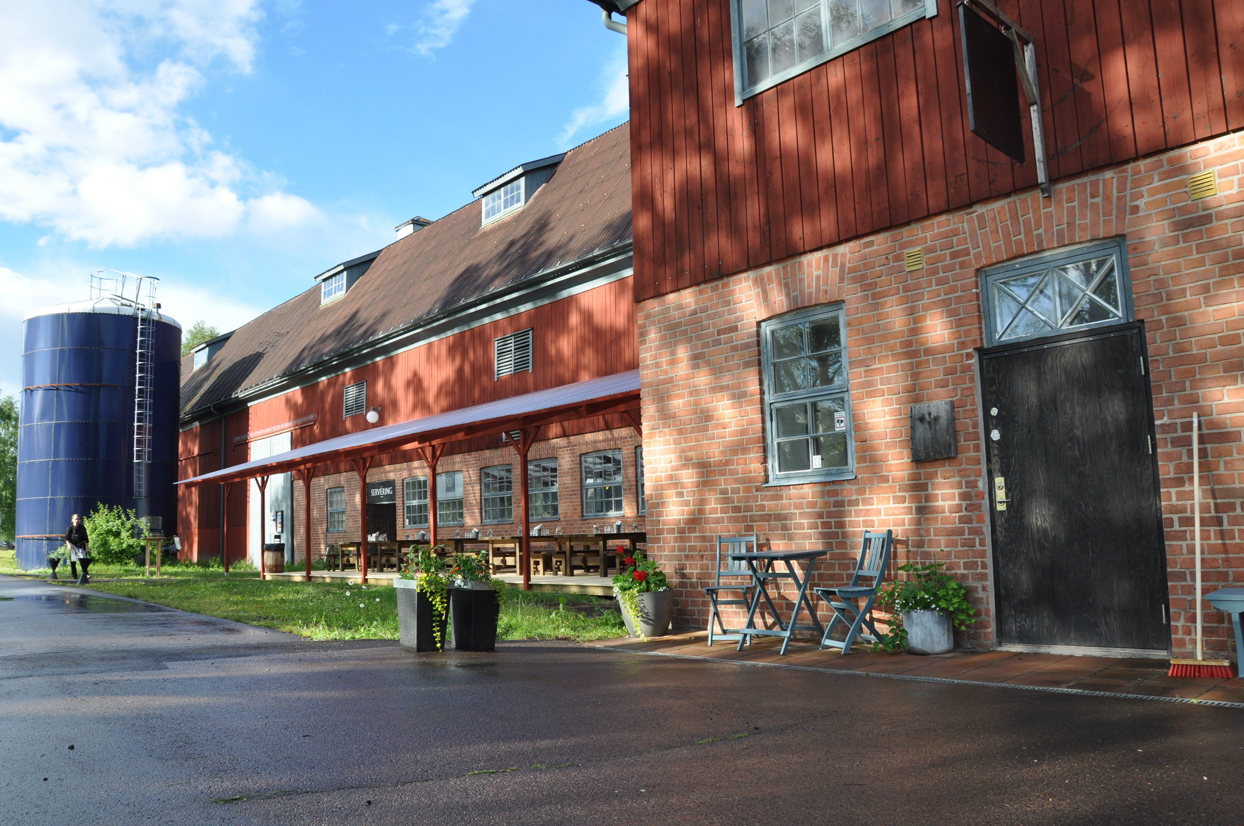 På bild: BerättarLadan, där Nya Västanå Teater spelar sina sommaruppsättningar.